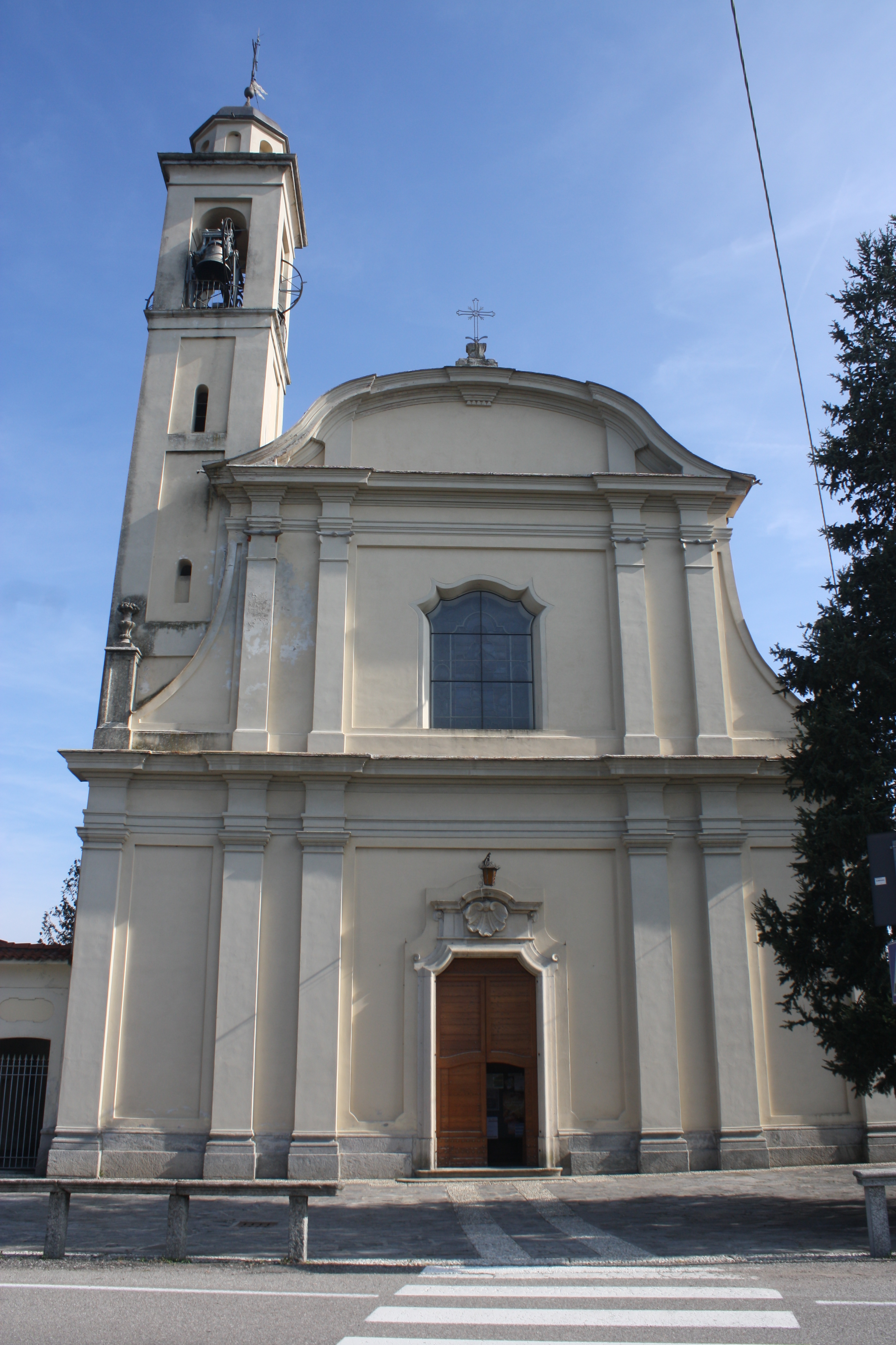 La chiesa di San Giovanni Evangelista a Caidate, frazione di Sumirago.